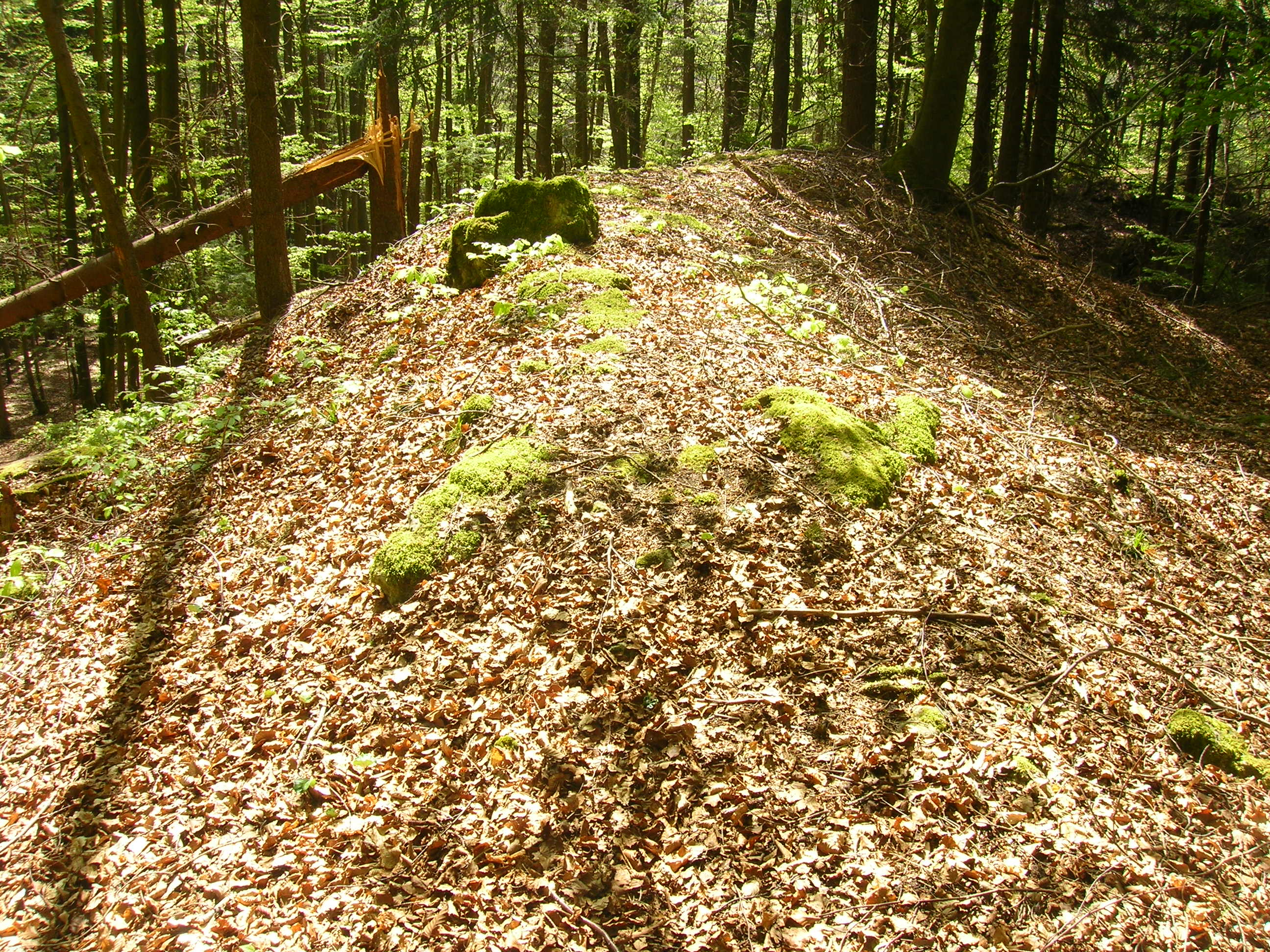 Abschnittsbefestigung Burggraf - Blick auf den Hauptwall, rechts die Burgfläche